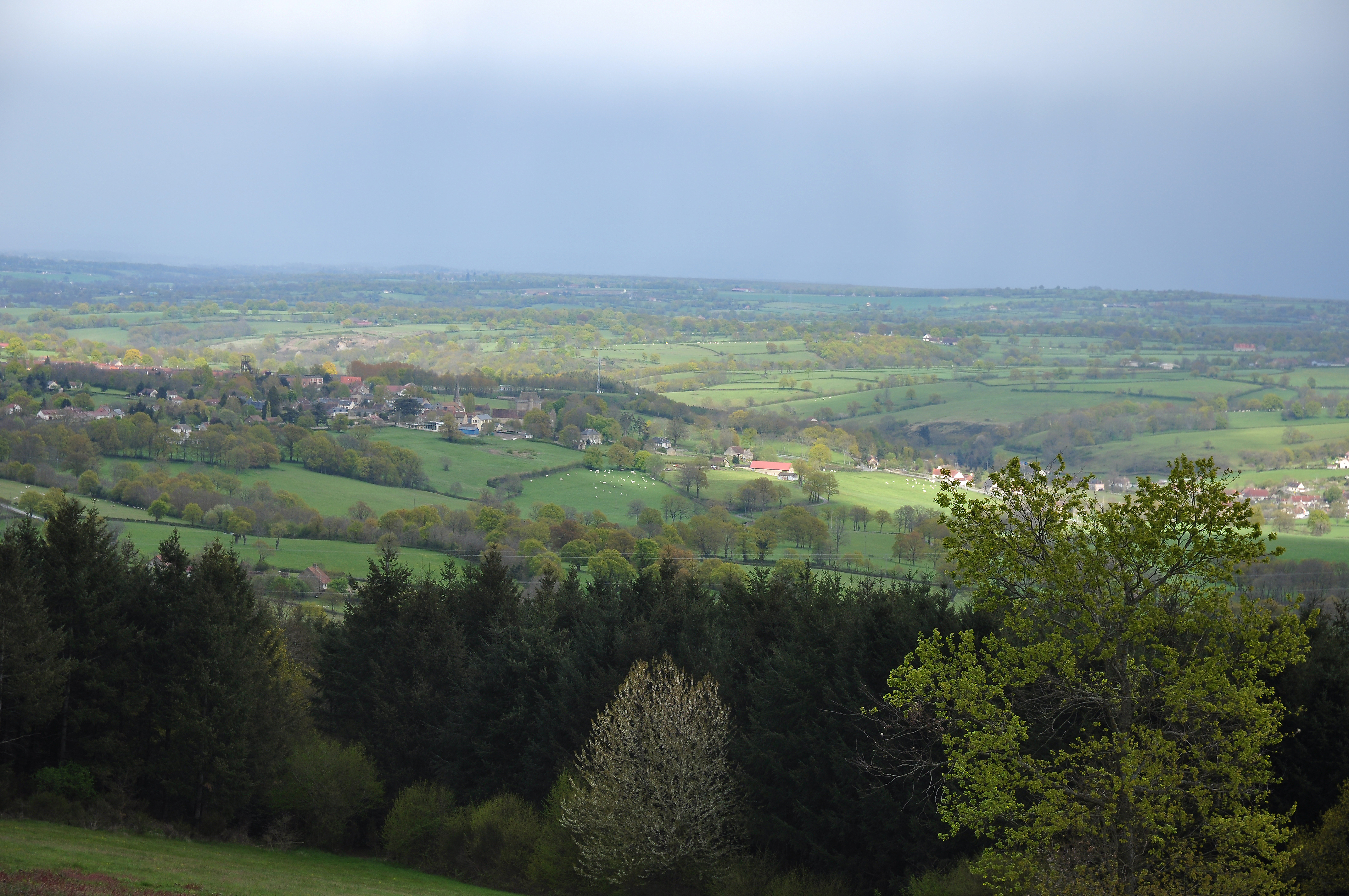 Photo prise du Panorama des côtes Matras. Région à l'ouest de Moulins. On distingue, au centre de la photo, le village de NOYANT (canton de Souvigny, arrondissement de Moulins). La course des nuages d'Avril, fait jouer les couleurs sur la terre Bourbonnaise.